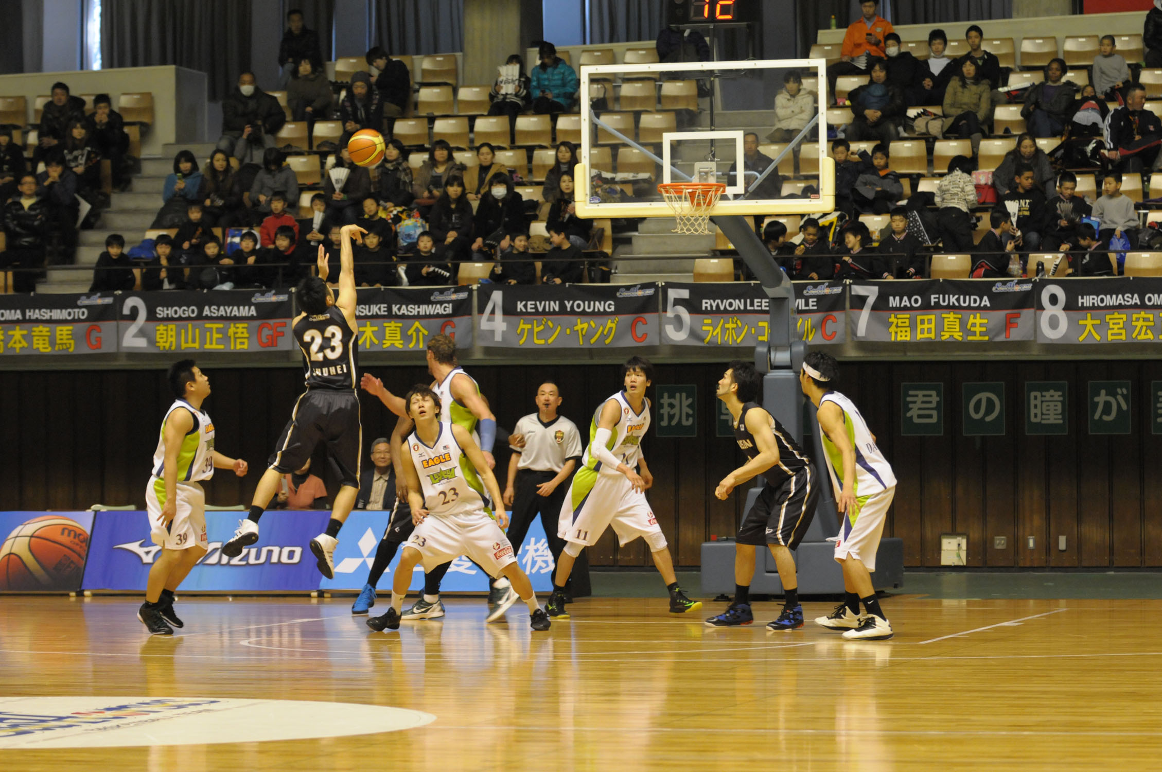 JBL 2012-2013シーズン、アイシンシーホース対レバンガ北海道。秋田県立体育館。